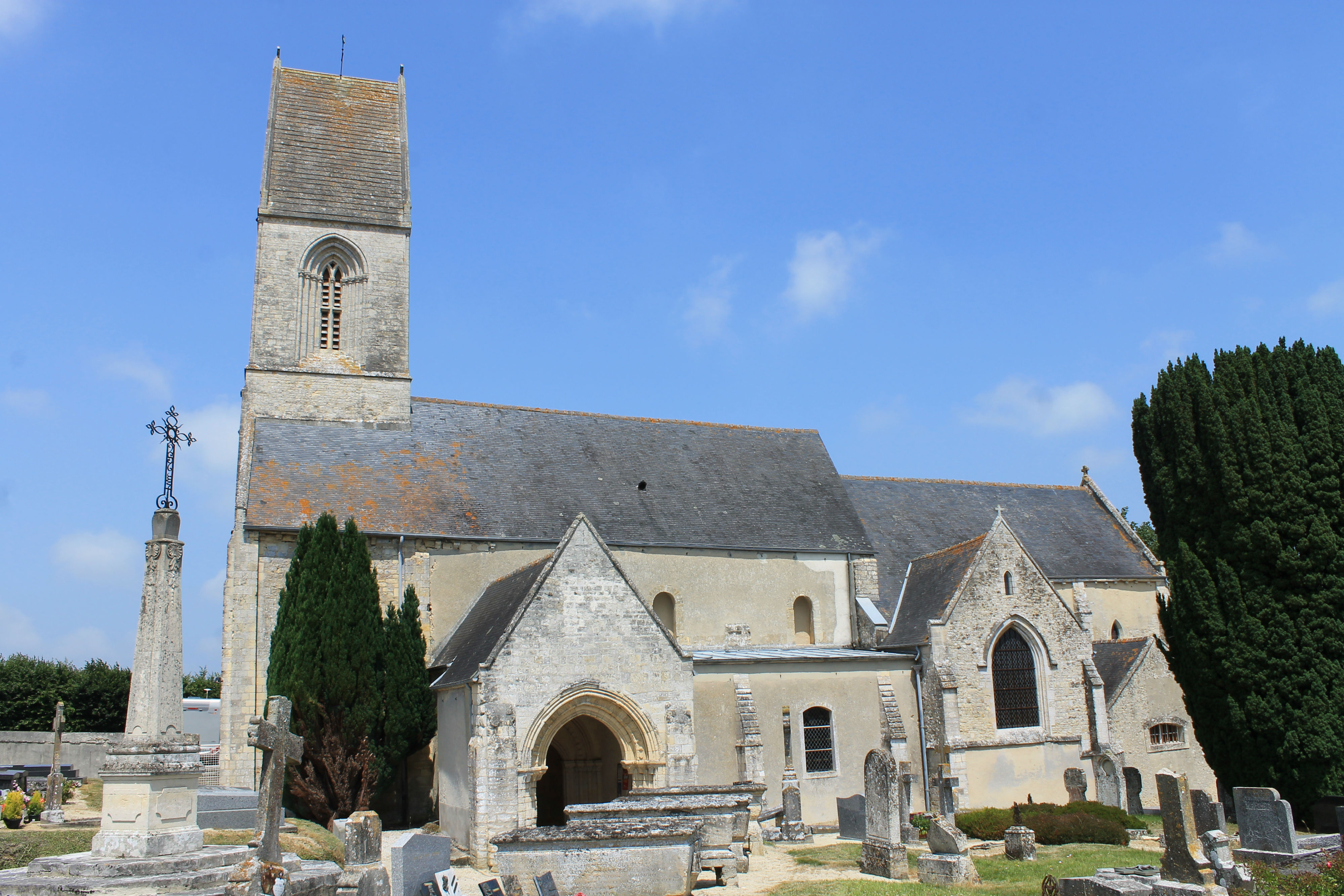 Église Saint-Martin de Nonant (Calvados)